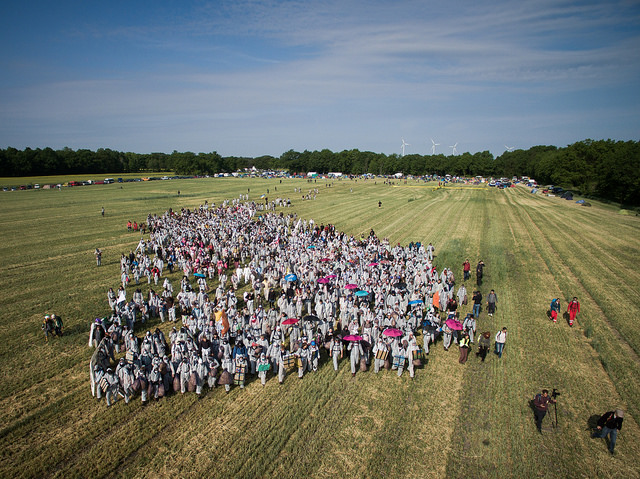 Auszug des grünen Fingers aus dem Lausitzcamp (im Hintergrund), Freitag 13. Mai 2016. CC Ende Gelände 2016